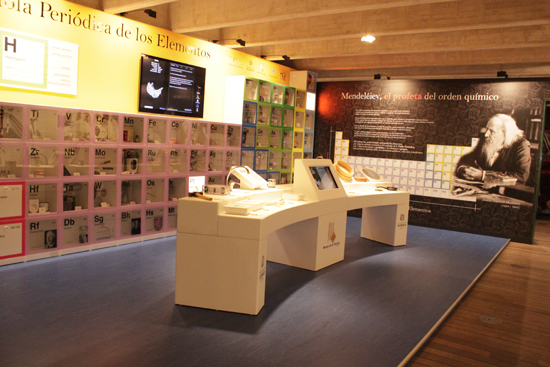 Tabla periódica gigante e interactiva ubicada en la planta -1 del Museo de la Ciencia de Valladolid.